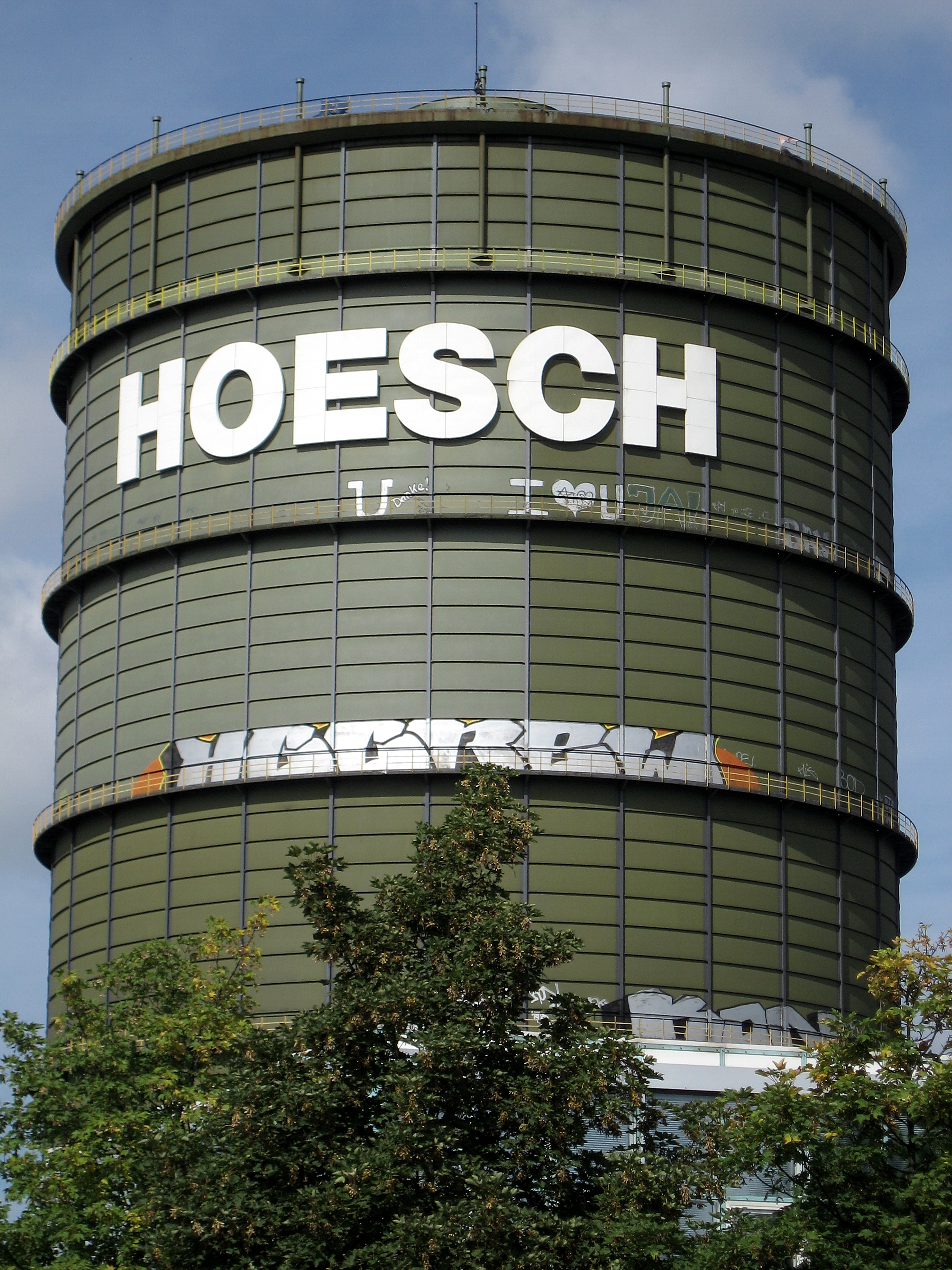 Dortmund, Hoesch Phoenix-West, Gasometer, Südseite